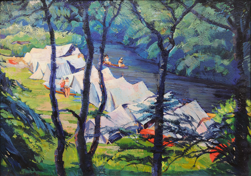 Zelte und Kanufahrer an der Oberalster. Öl auf Karton, 51 x 71,5 cm